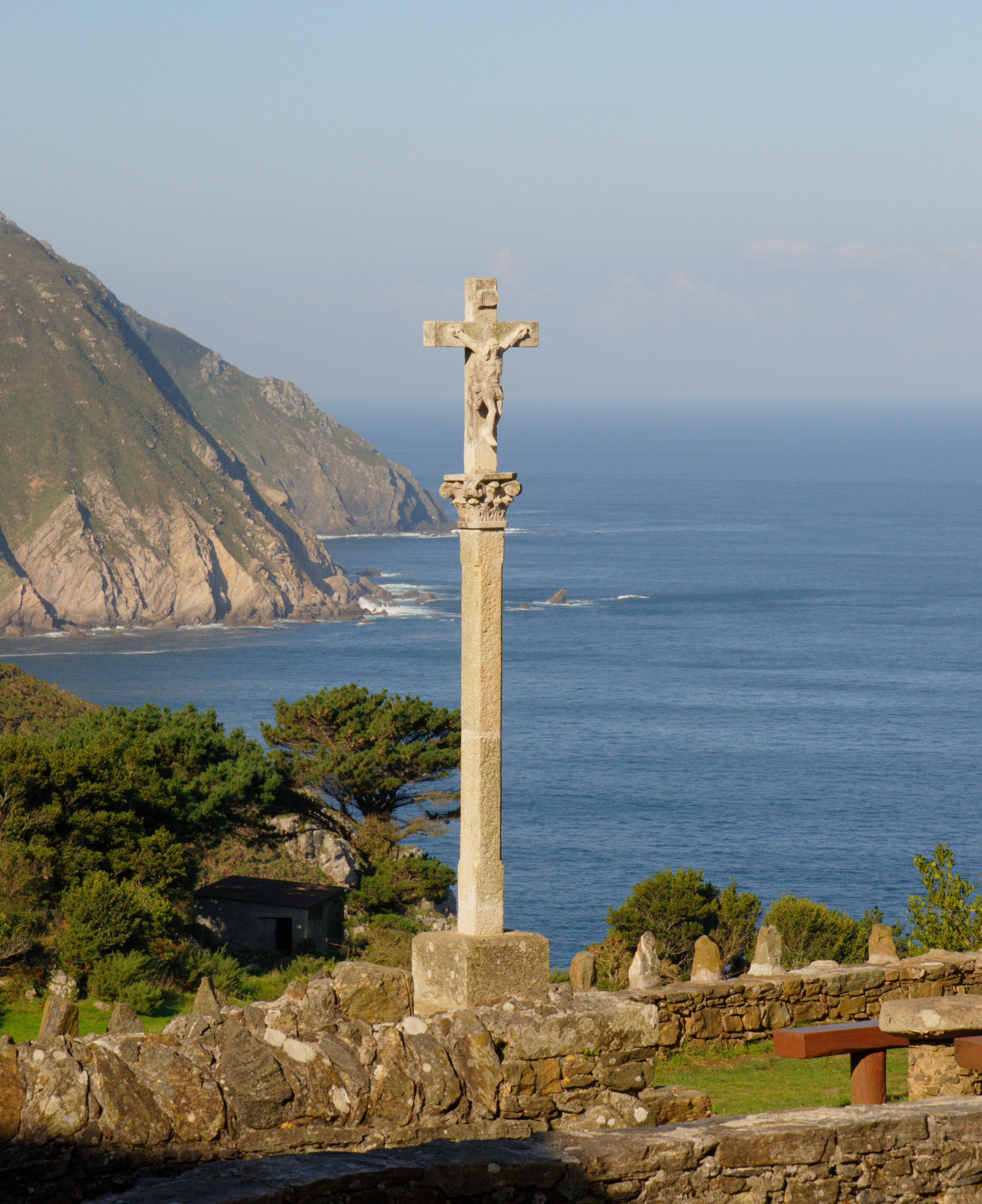 Kruzifix vor der Wallfahrtskapelle San Andrés de Teixido